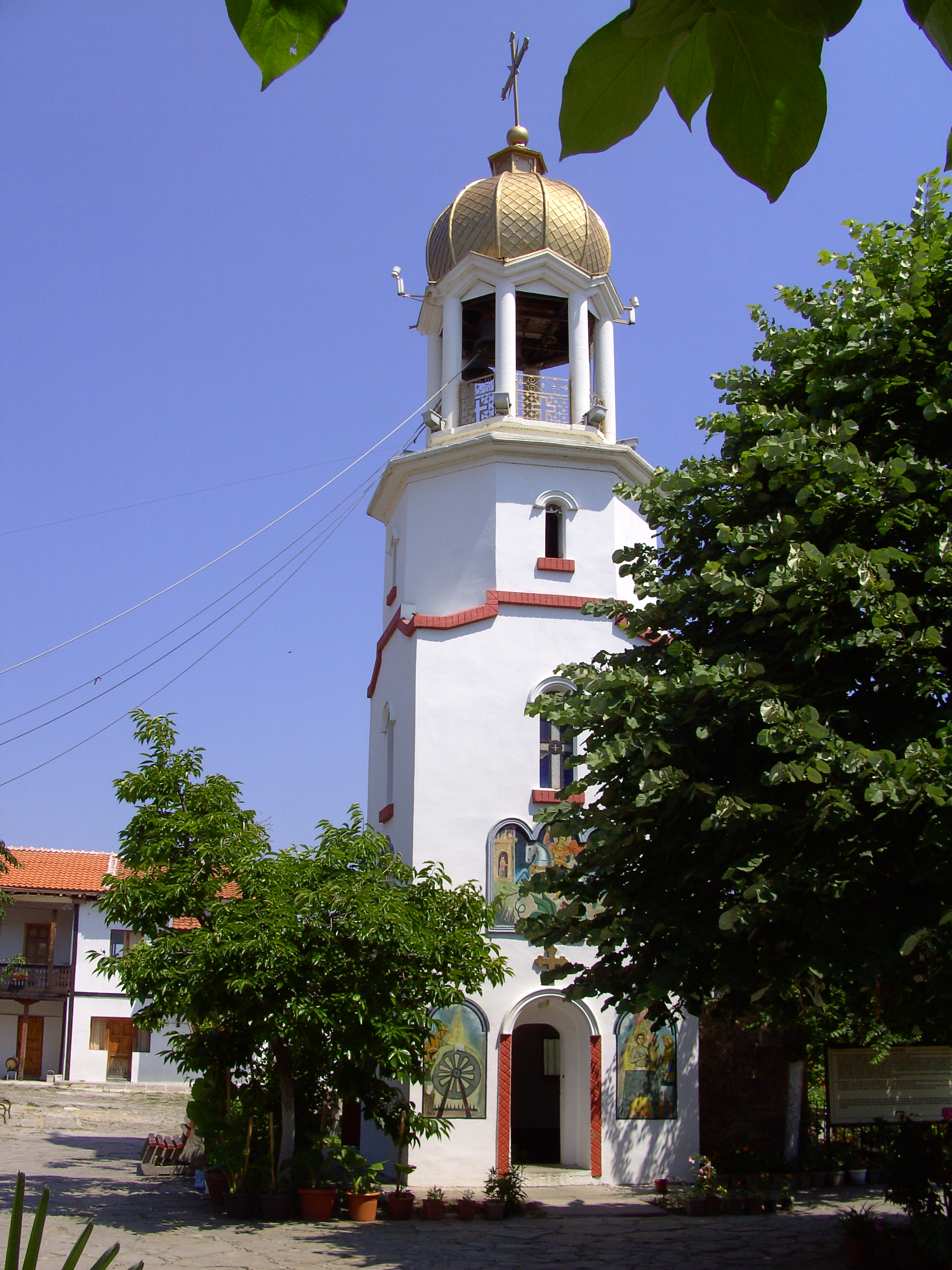 Glockenturm des Klosters Pomorie, im Untergeschoss befindet sich die heilige Quelle